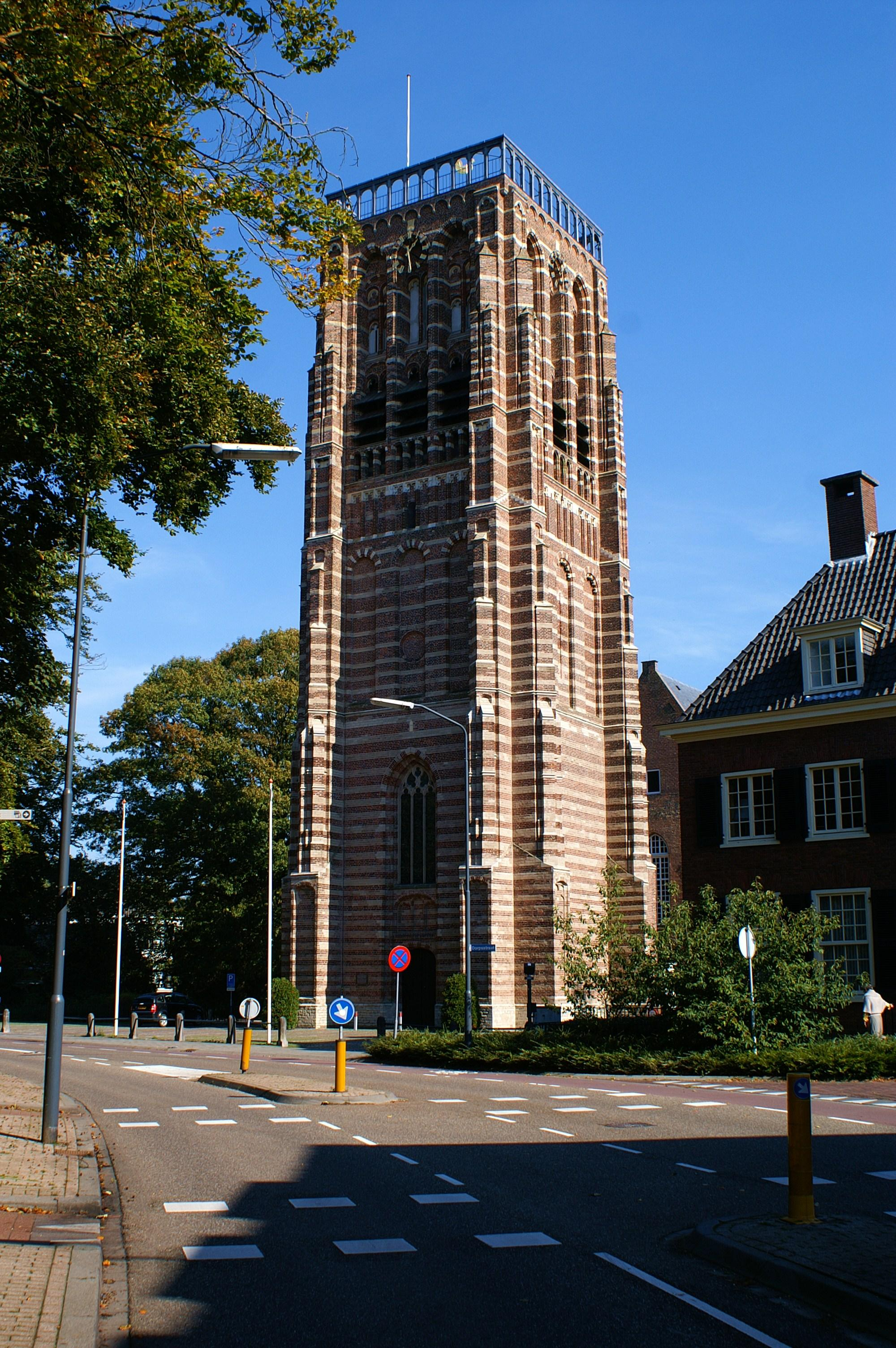 Toren van de Nederlands Hervormde kerk te Vught.